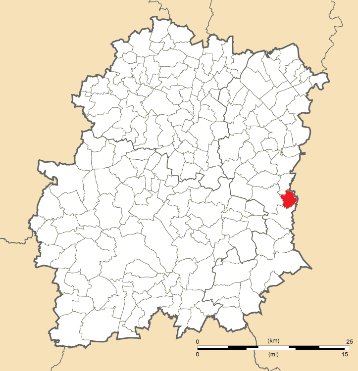 Carte de position de Nainville-les-Roches en Essonne (91)